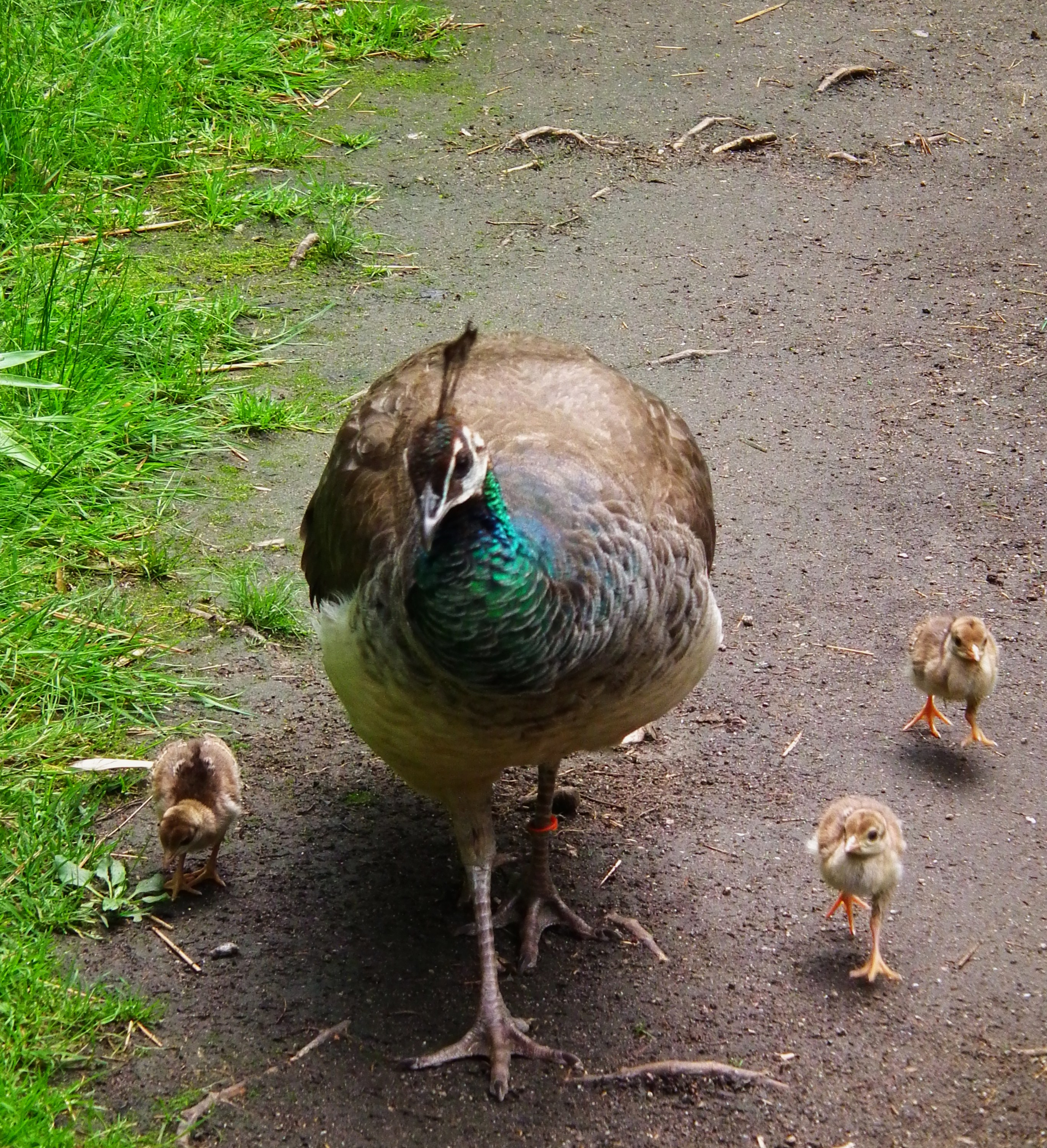 Blauer Pfau (Pavo cristatus), aufgenommen im Wildpark Alte Fasanerie in Klein-Auheim (Hessen, Deutschland)